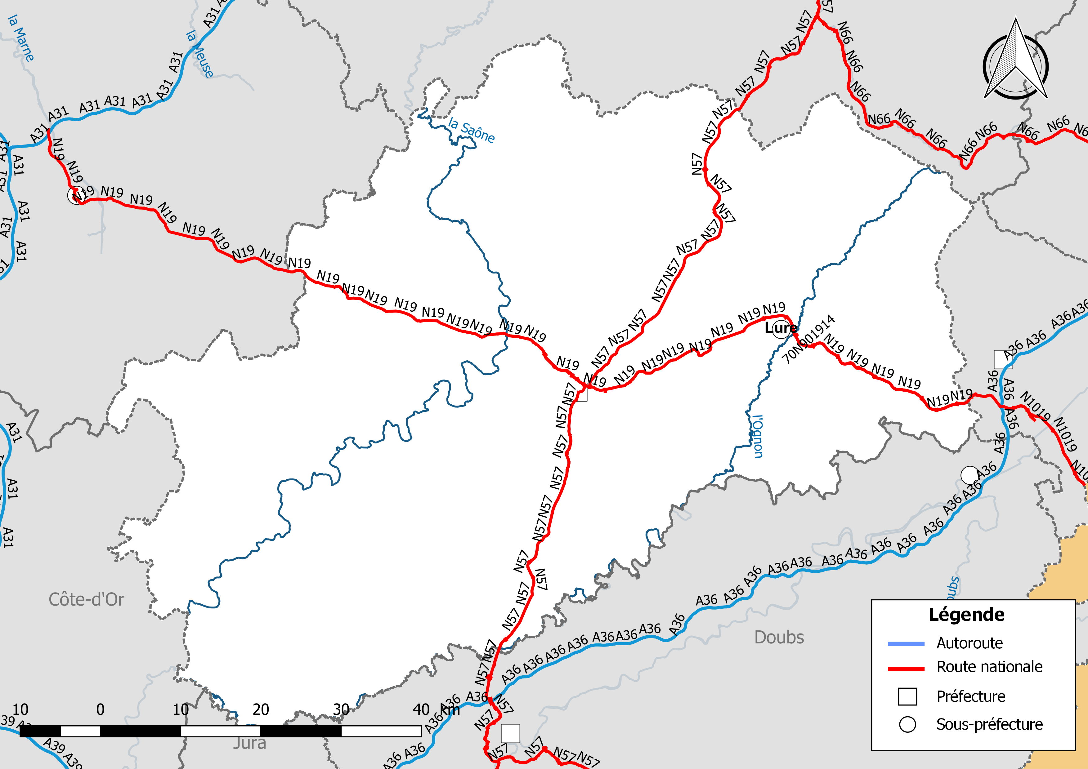 Carte du réseau routier national, constitué des autoroutes et des routes nationales, dans le département de la Haute-Saône (France). Situation au 1er janvier 2019.